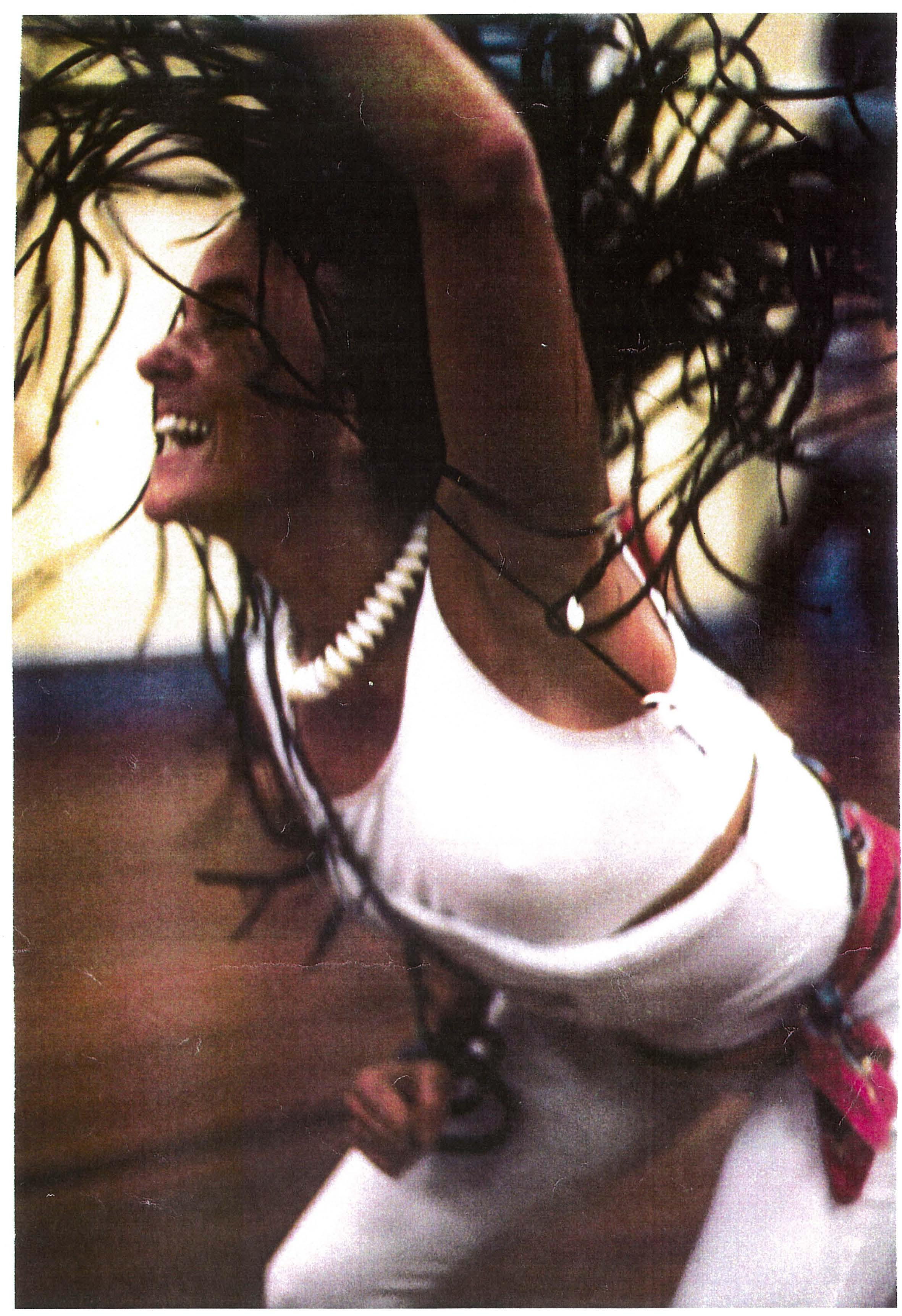 Jeanine claes dansante